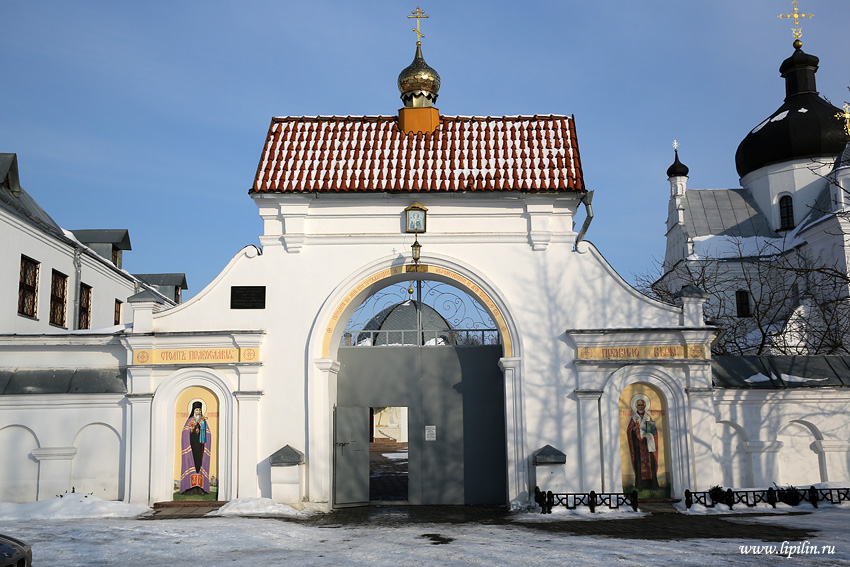 Магілёўскі Свята-Мікольскі манастыр. Брама